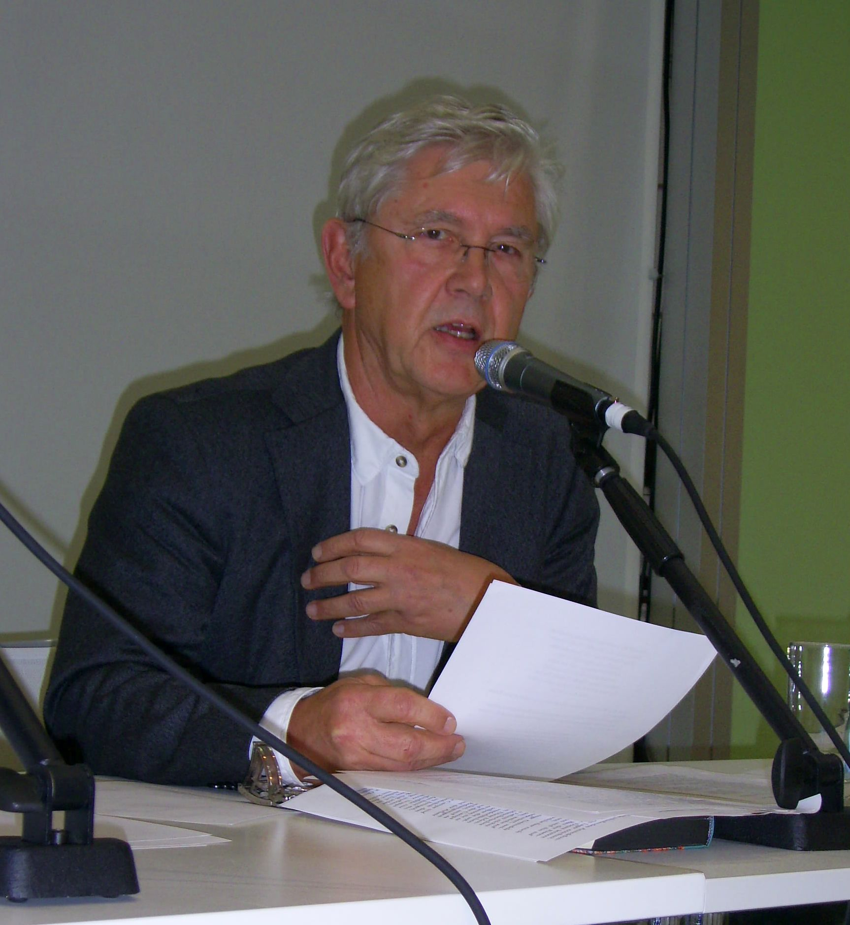 Dr. Johannes Zeilinger, Vorsitzender der Karl-May-Gesellschaft, bei einer Lesung aus Winnetou I auf der Leipziger Buchmesse 2014.